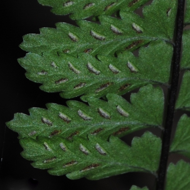 Asplenium sellowianum. Aspleniaceae. Fotos tomadas bajo bosque ribereño al margen del Arroyo David Ciego en Bajada de Pena, departamento de Rivera, Uruguay.